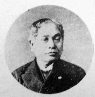 a Japanese man 大木喬任 (Takato Oki)